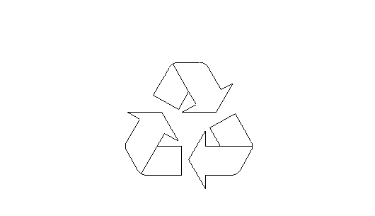 pictigrama reciclar final